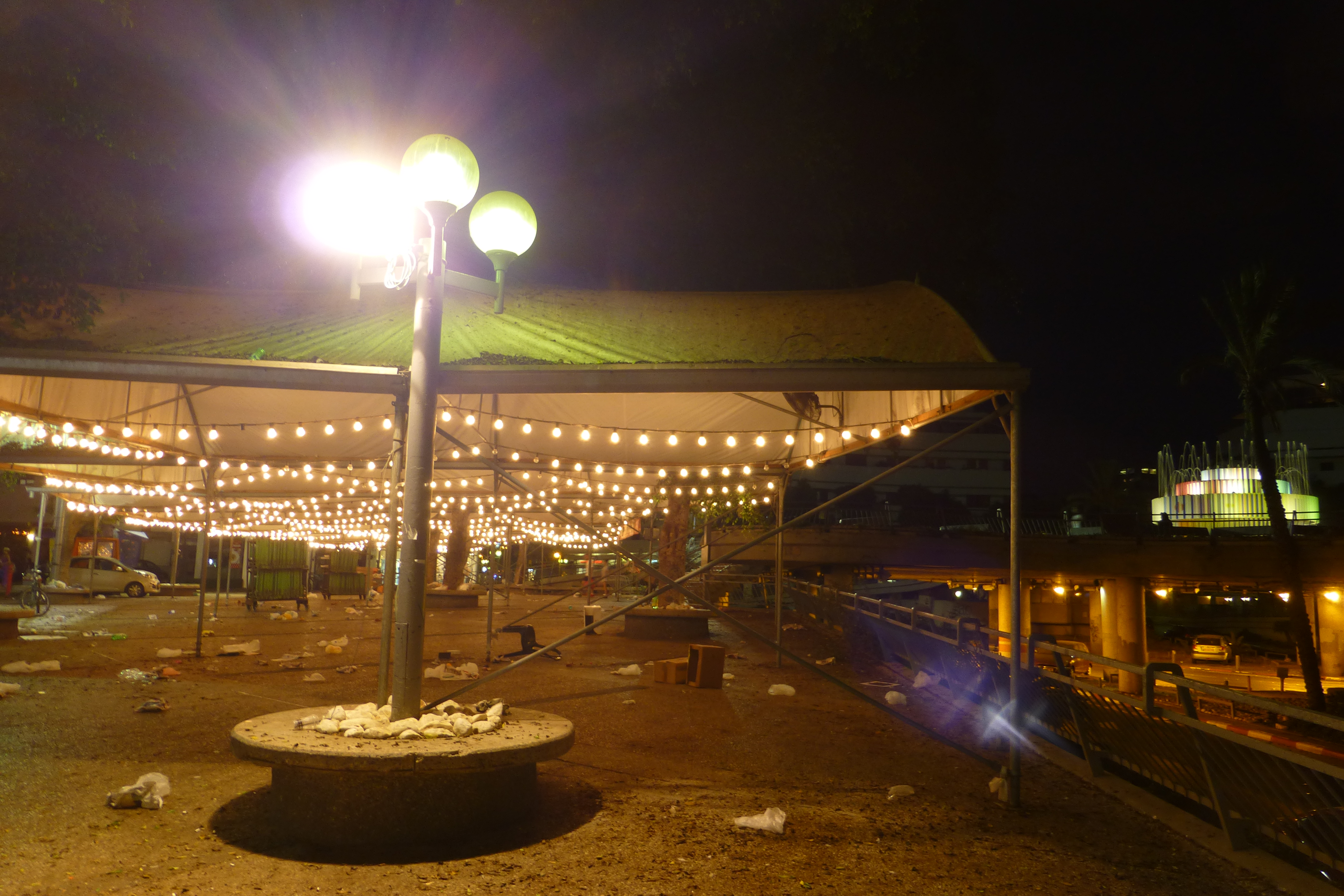 כיכר צינה דיזנגוף קרויה על שם צינה דיזנגוף, רעייתו של ראש העיר הראשון, מאיר דיזנגוף. הכיכר נחשבה במשך שנים רבות כאחד מסמליה של תל אביב. הכיכר הייתה חלק מתוכנית גדס, תוכנית מתאר לעיר תל אביב שהכין פטריק גדס, מתכנן ערים סקוטי. עיצוב הכיכר נעשה על ידי האדריכלית ג'ניה אוורבוך, שזכתה בתחרות העיצוב של הכיכר בשנת 1934. התכנון היה על פי קריטריונים של הסגנון הבינלאומי, שהיה הסגנון האדריכלי המרכזי בתל אביב בתקופה זו.